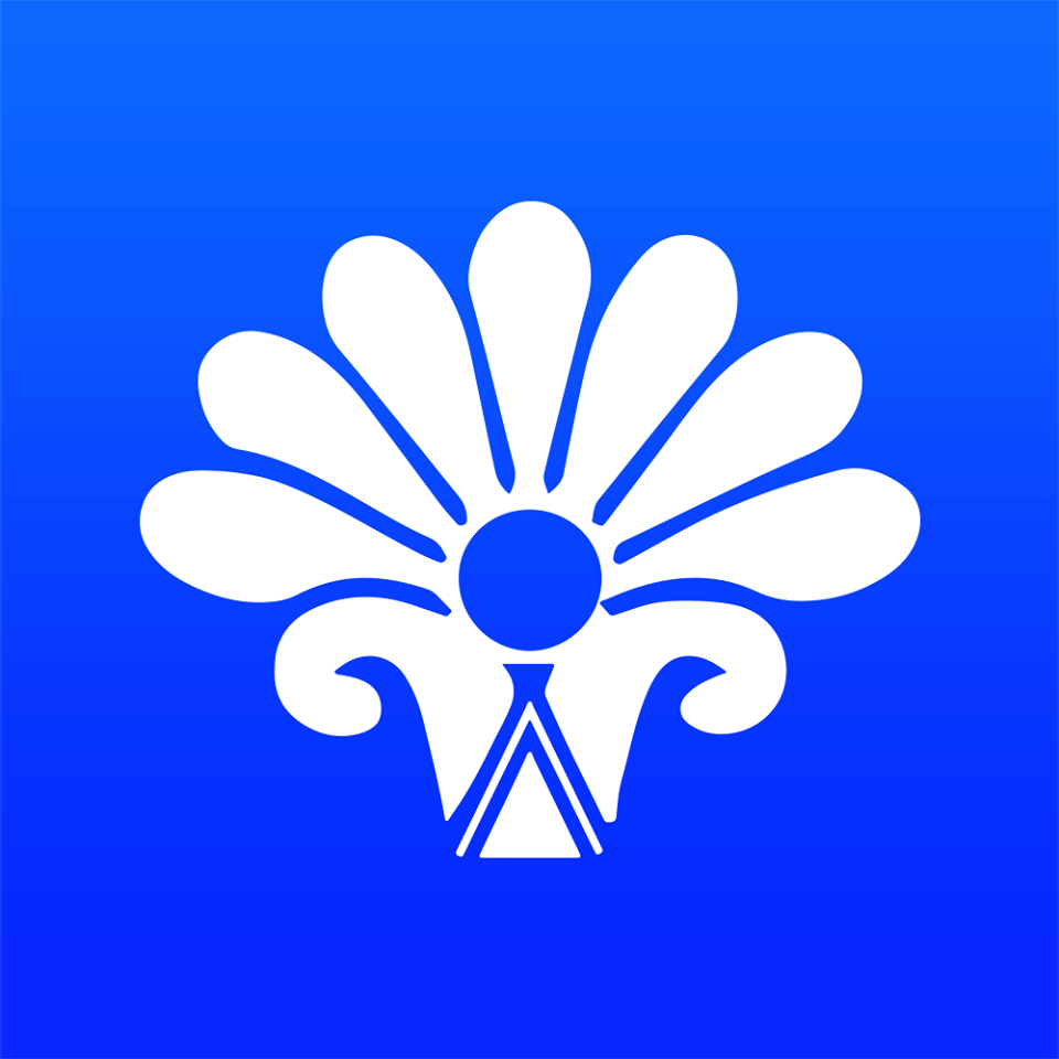 شعار مصرف اشور الدولي